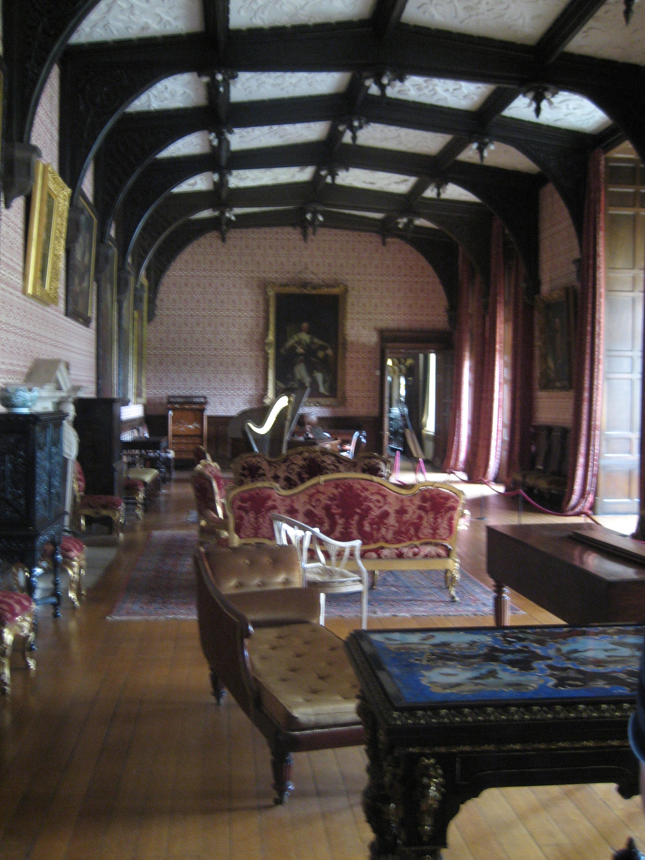 Musikzimmer von Newstead Abbey